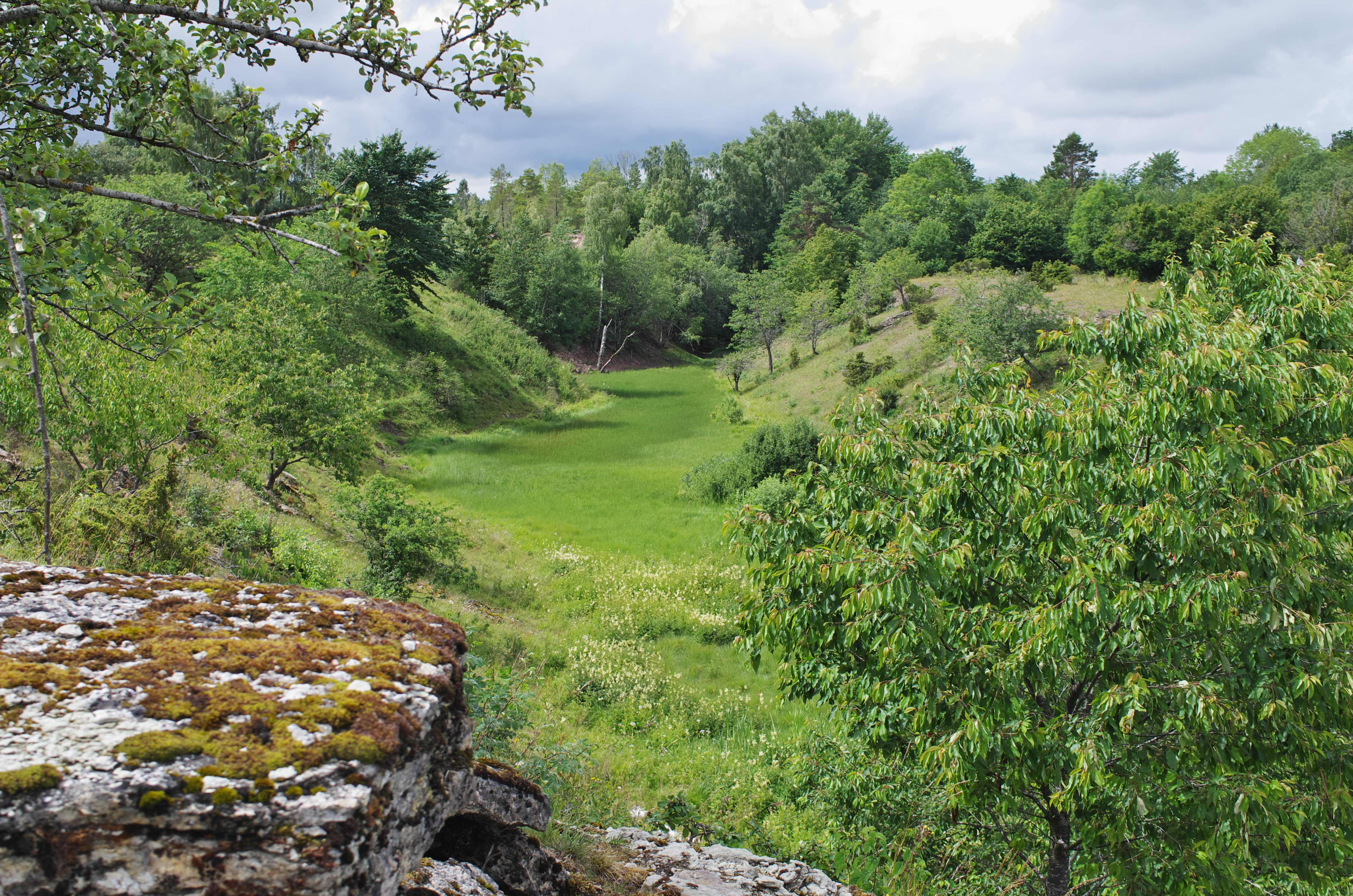 Naturreservatet Djupadalen (i Dala socken) i Falköpings kommun i Västergötland i Sverige.